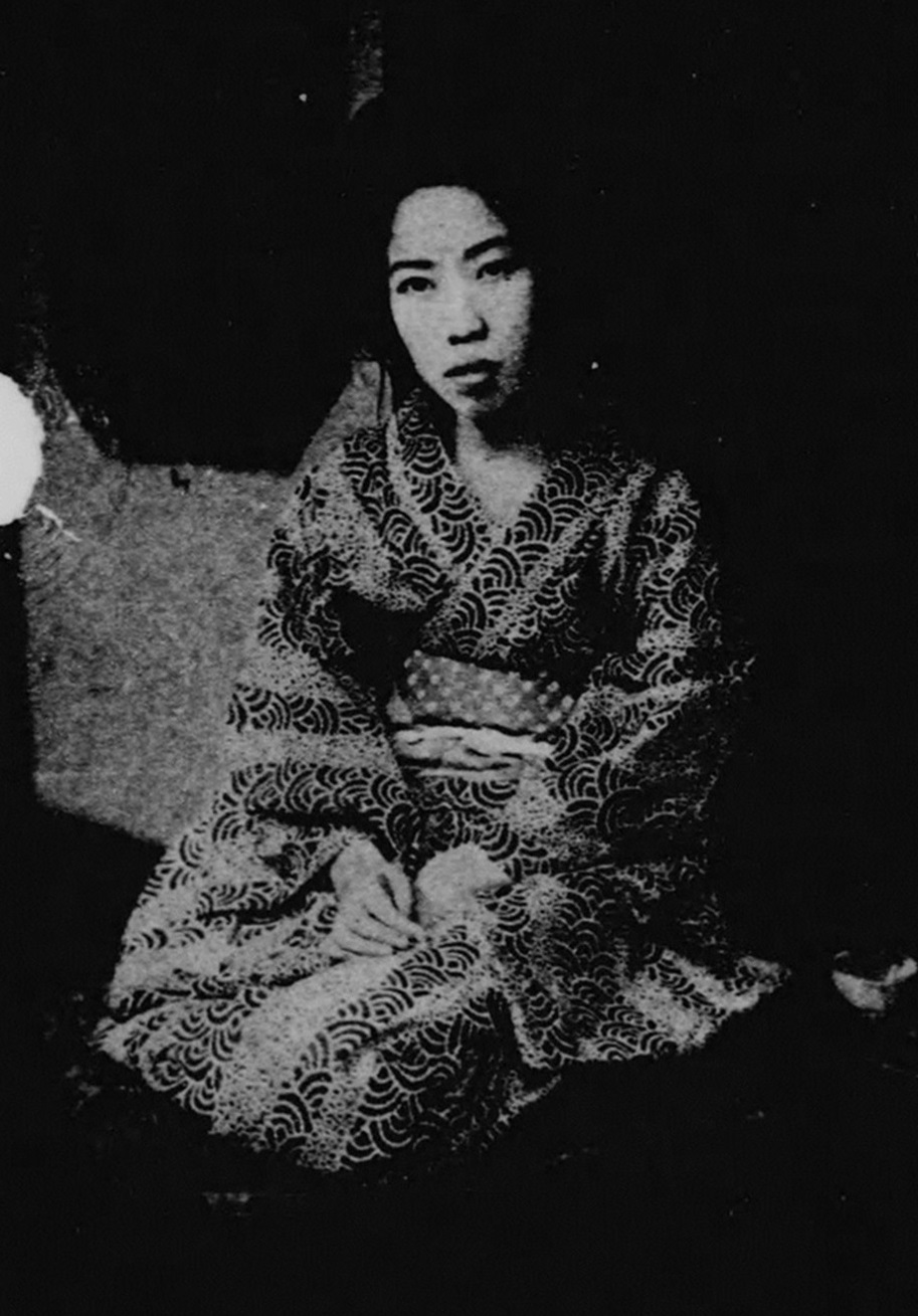 作家・素木しづの写真